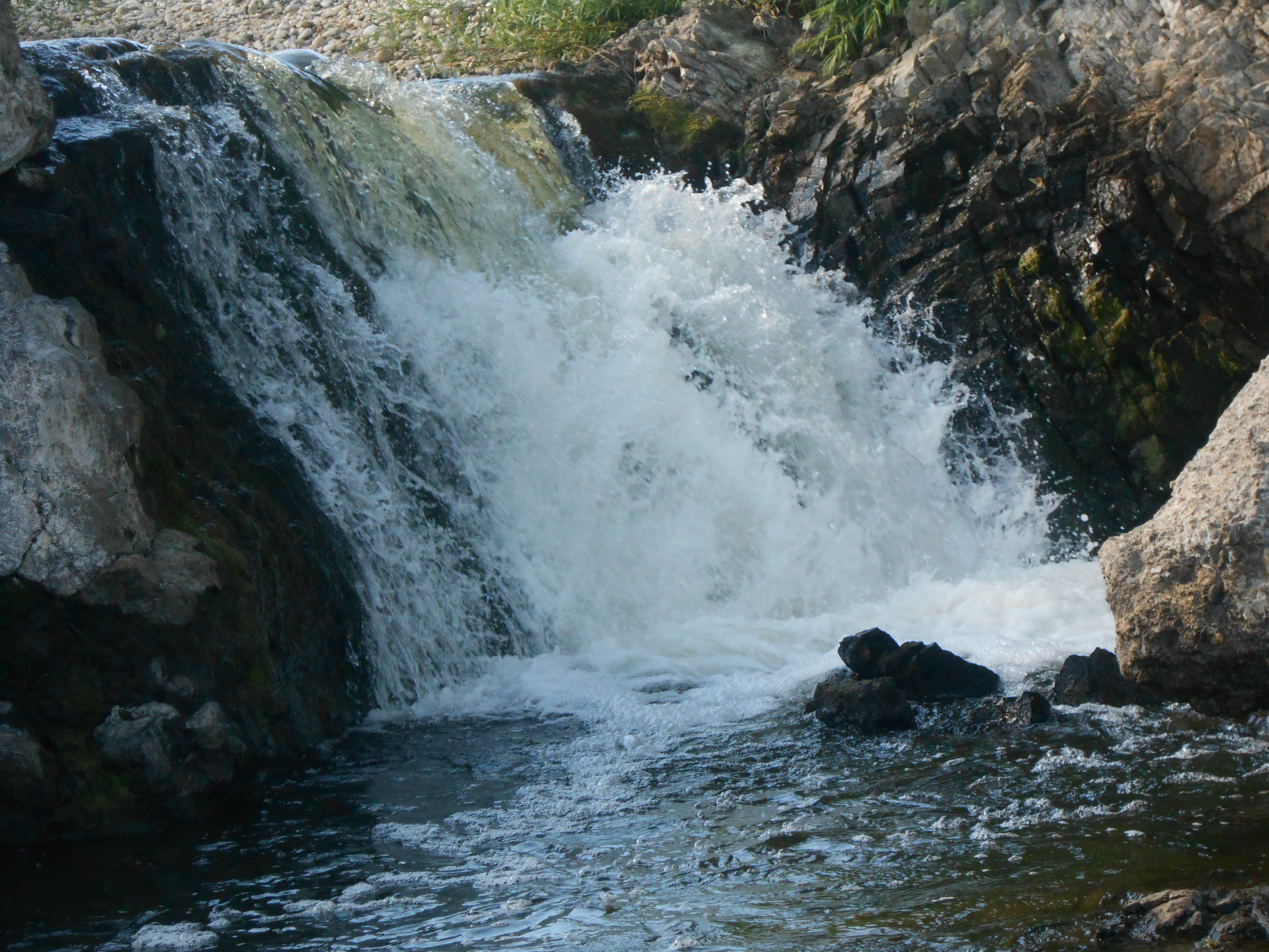 Водопад в Хайбуллинском районе РБ